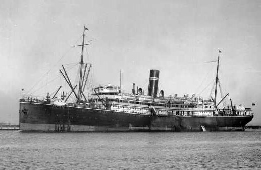 Kanowna